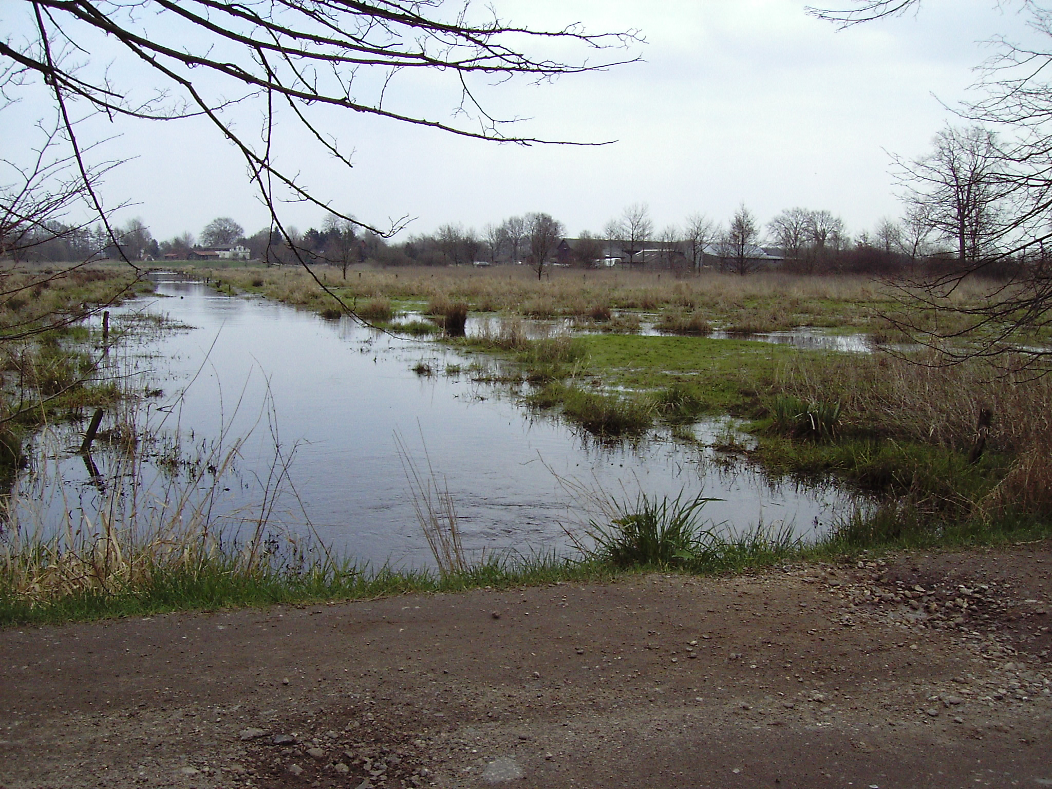 Pohnsdorfer Stauung - Ostpolder, Blick in nordöstliche Richtung